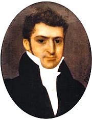 Porträt von Jacob Anton Mayer von einem unbekannten Künstler